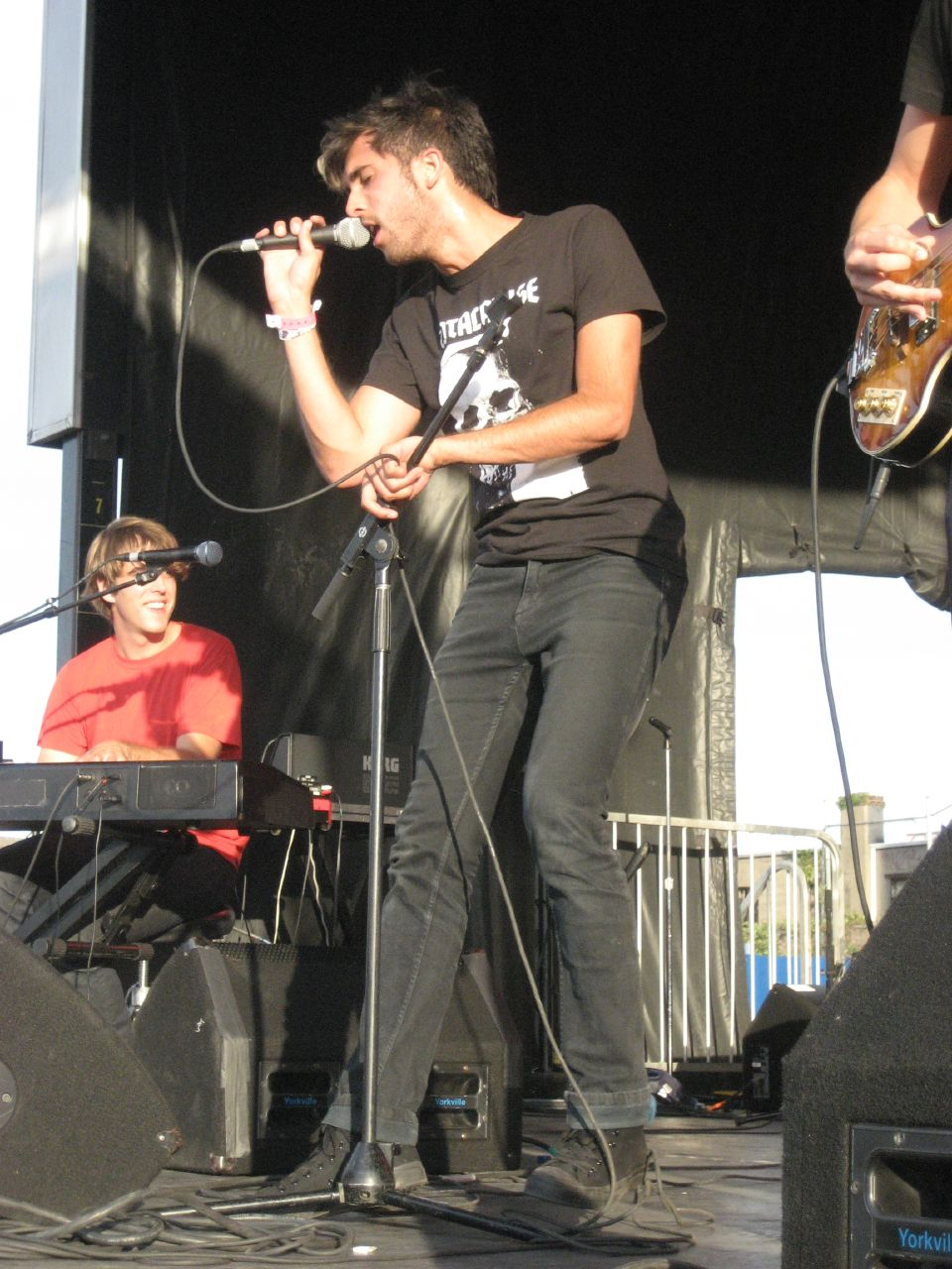 voxtrot_215